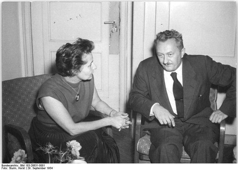 Zentralbild Sturm 29.9.1954 Ansprache im Schriftstellerverband der DDR mit polnischen und französischen Gästen UBz: Die Schriftstellerin Tilly Bergner im Gespräch mit dem polnischen Literaturwissenschaftler J. Dobraczynski.